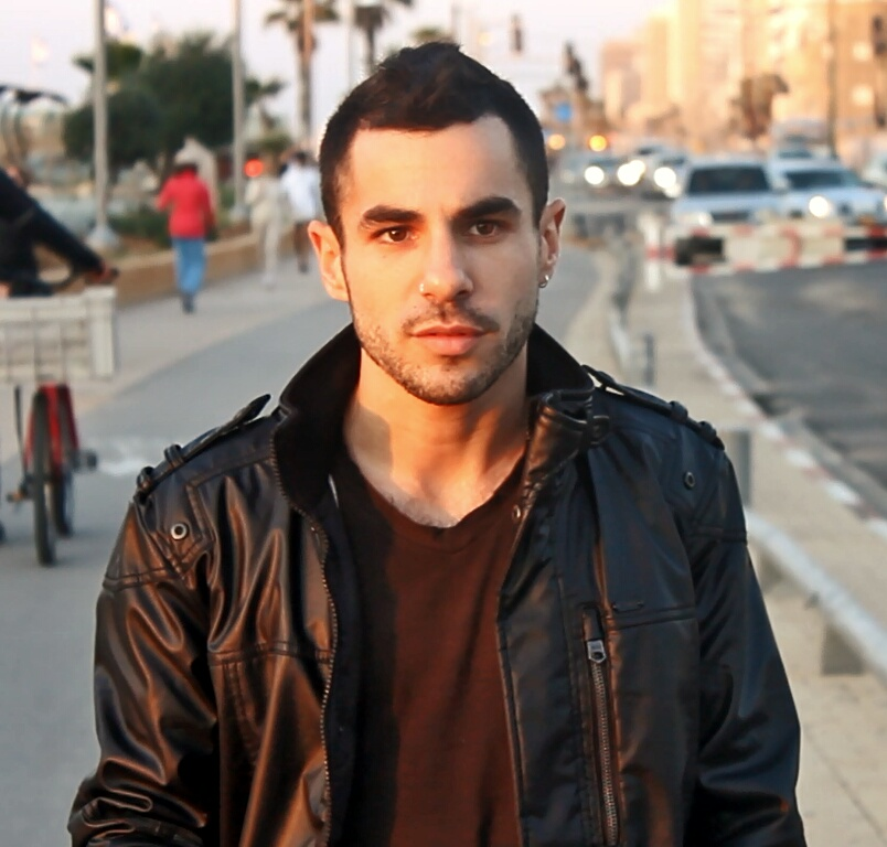 Photographer: Dekel Lazimi Lev